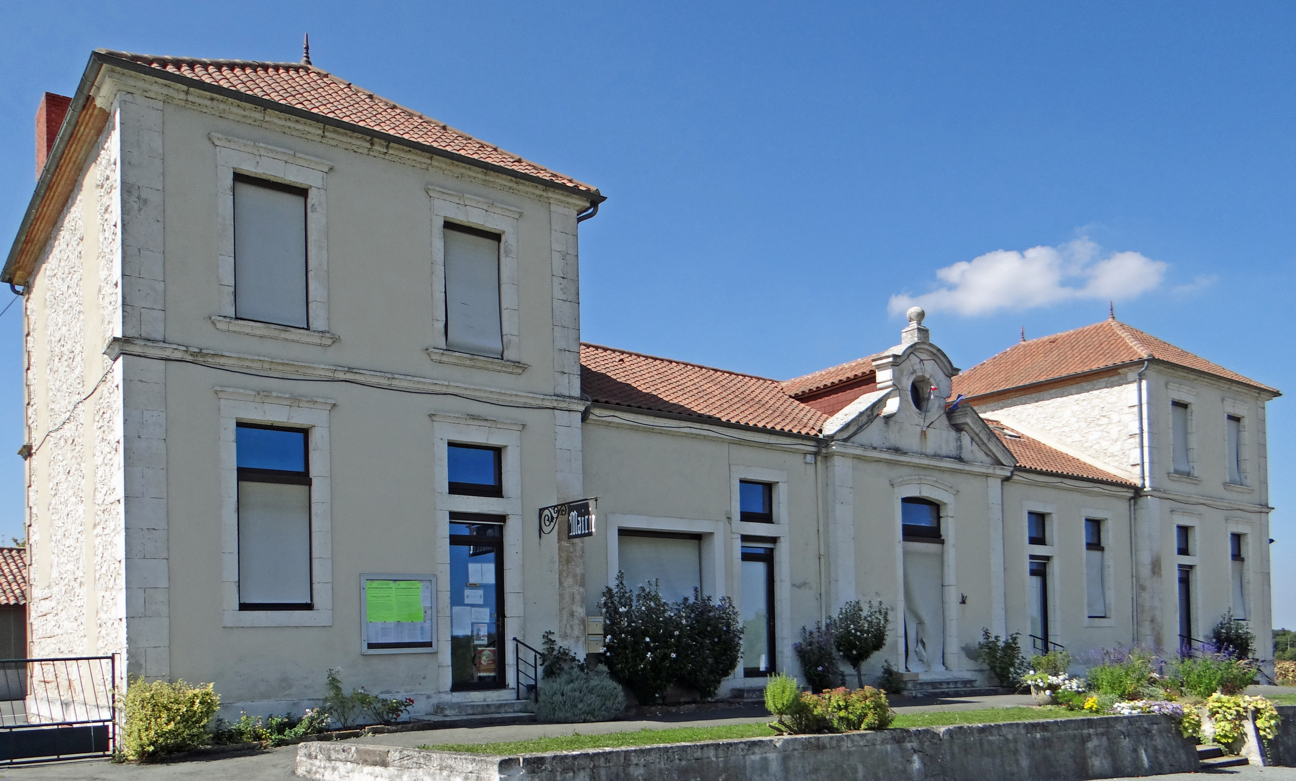 Savignac-sur-Leyze - Mairie-école